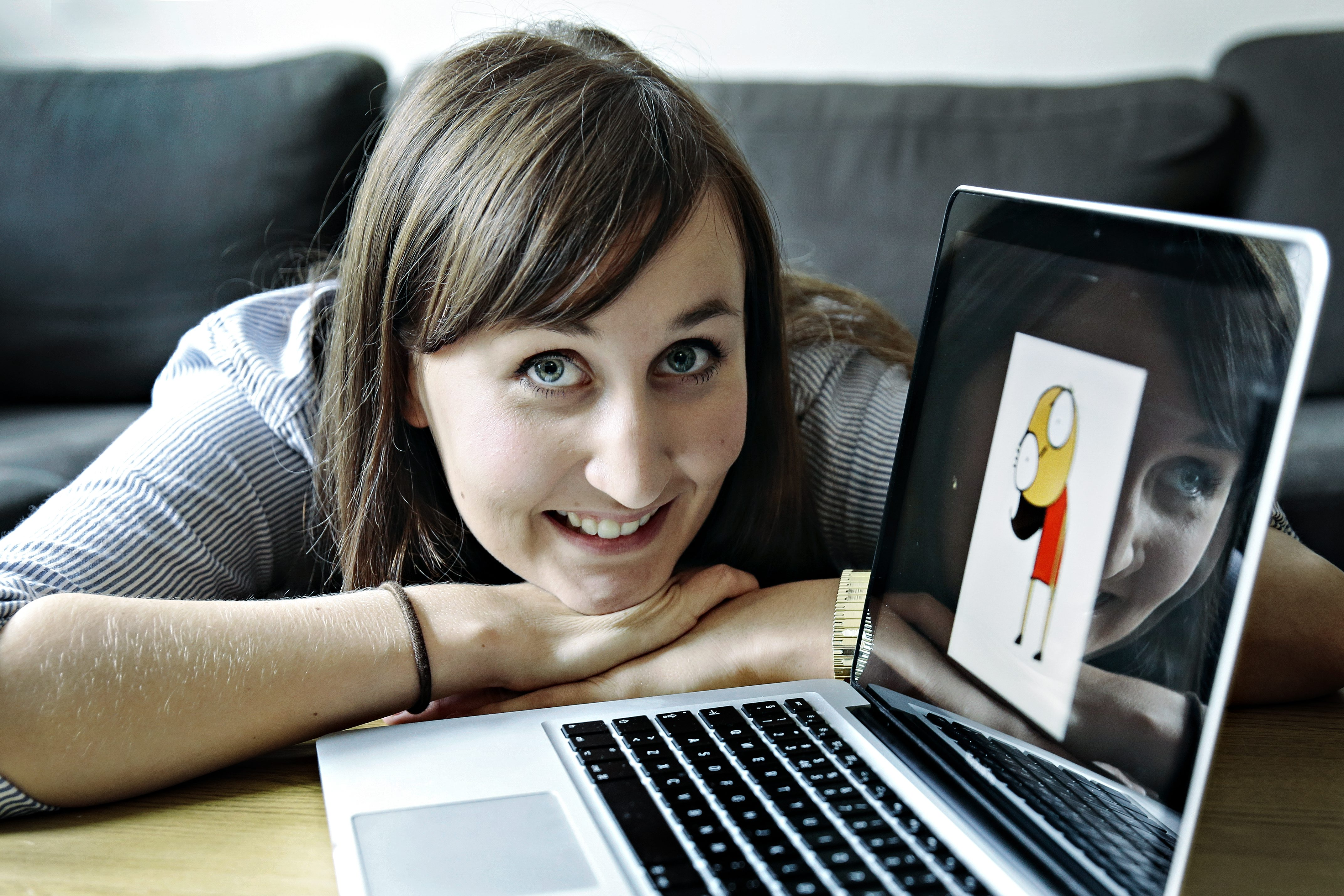 Den norske tegneserieskaperen Hanne Sigbjørnsen